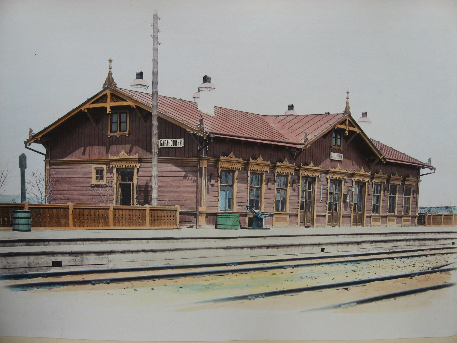 Беларуская (тарашкевіца): Баранавічы (Baranavičy). Чыгуначная станцыя